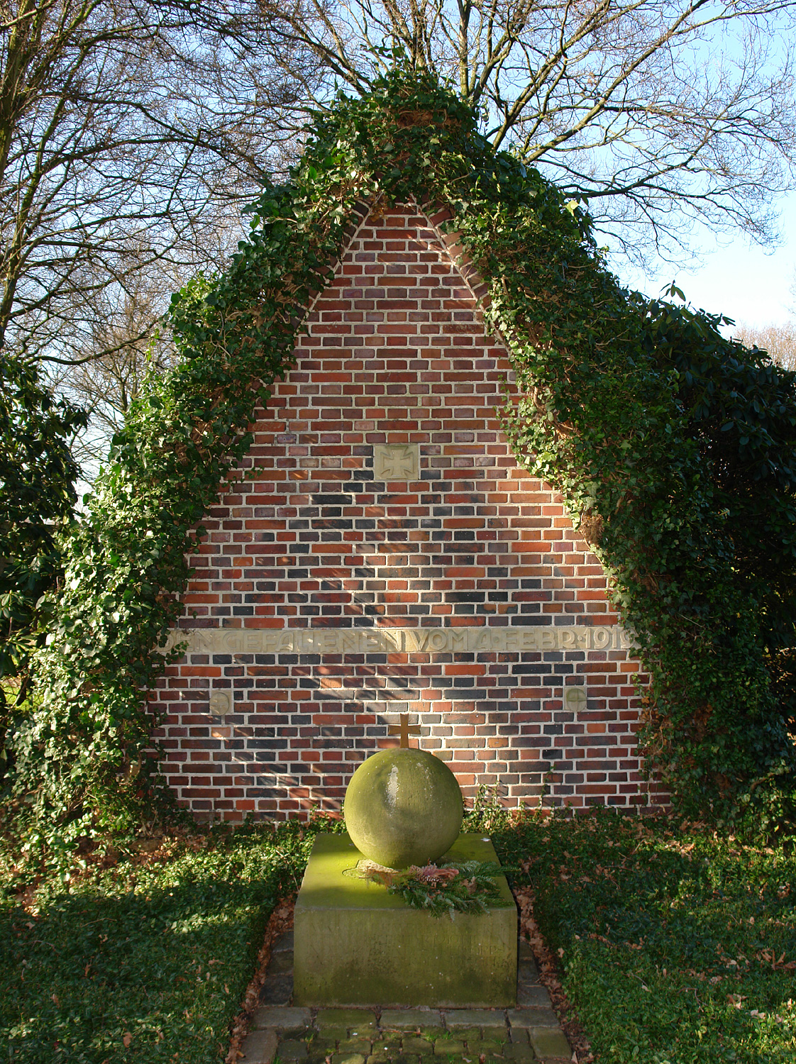 Waller Friedhof in Bremen. Grabmal der Division Gerstenberg